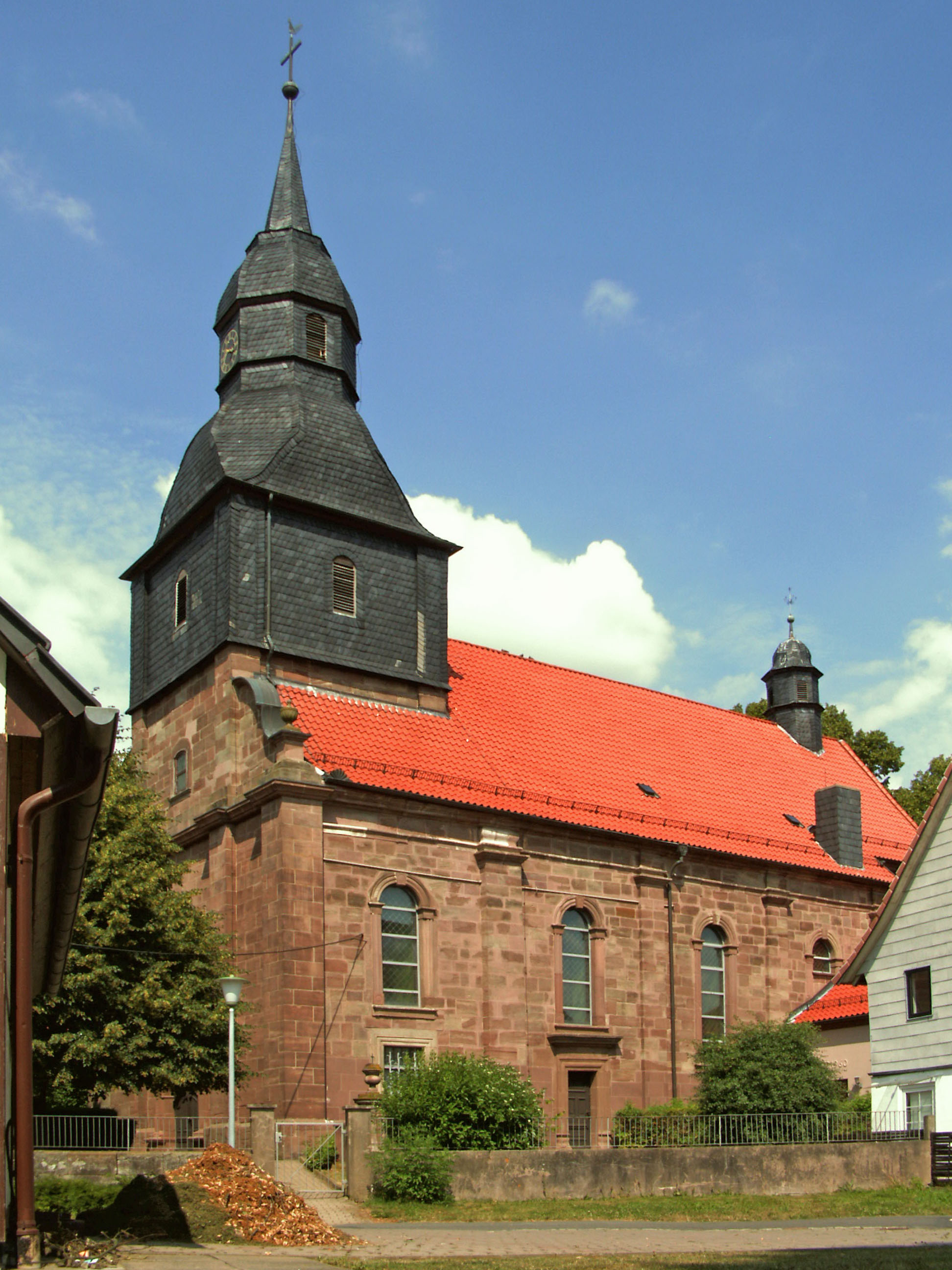 Katholische Kirche St. Martinus in Seeburg, Landkreis Göttingen